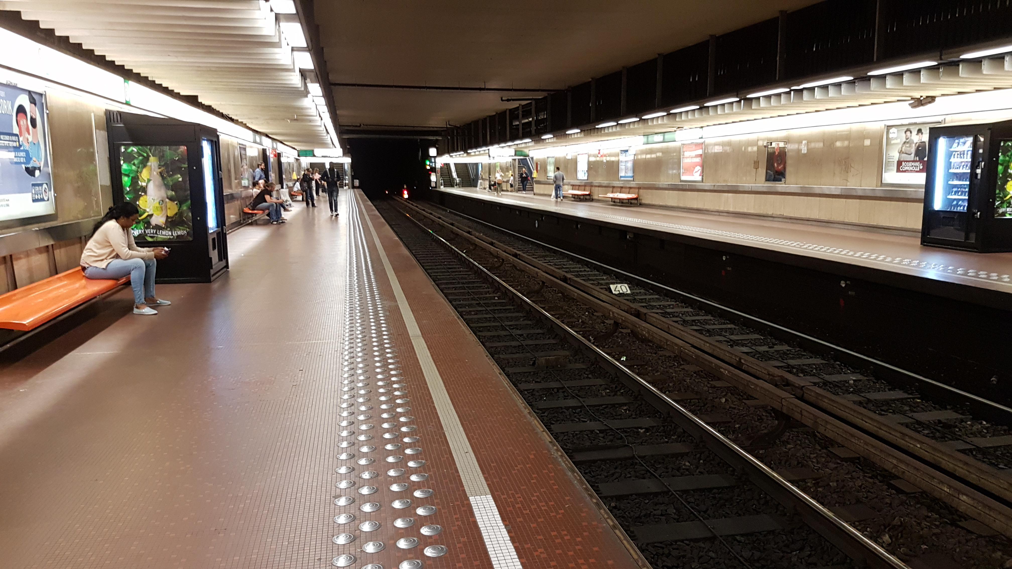 Station de metro Madou, Bruxelles